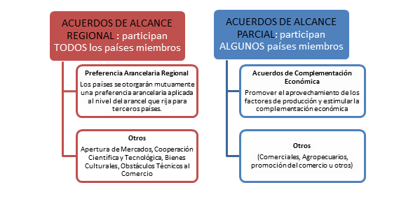 Esquema de Acuerdos